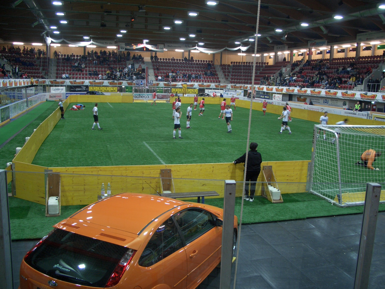 Hallenmasters 2006 - Das Spielfeld beim Einwaermen vor dem Spiel Winti-Wil